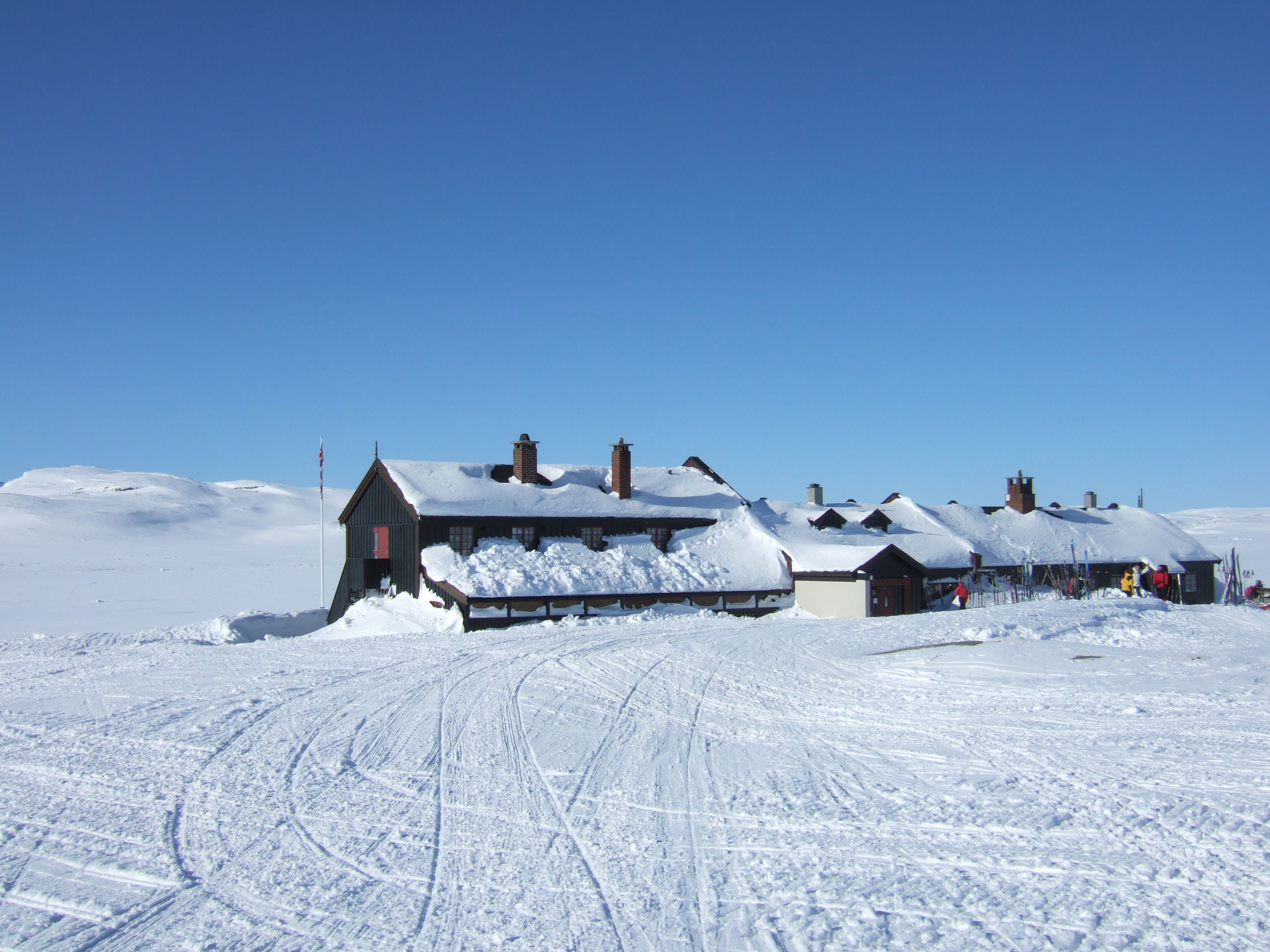 Betjent turisthytte på Hardangervidda. Bilde tatt påsken 2013.